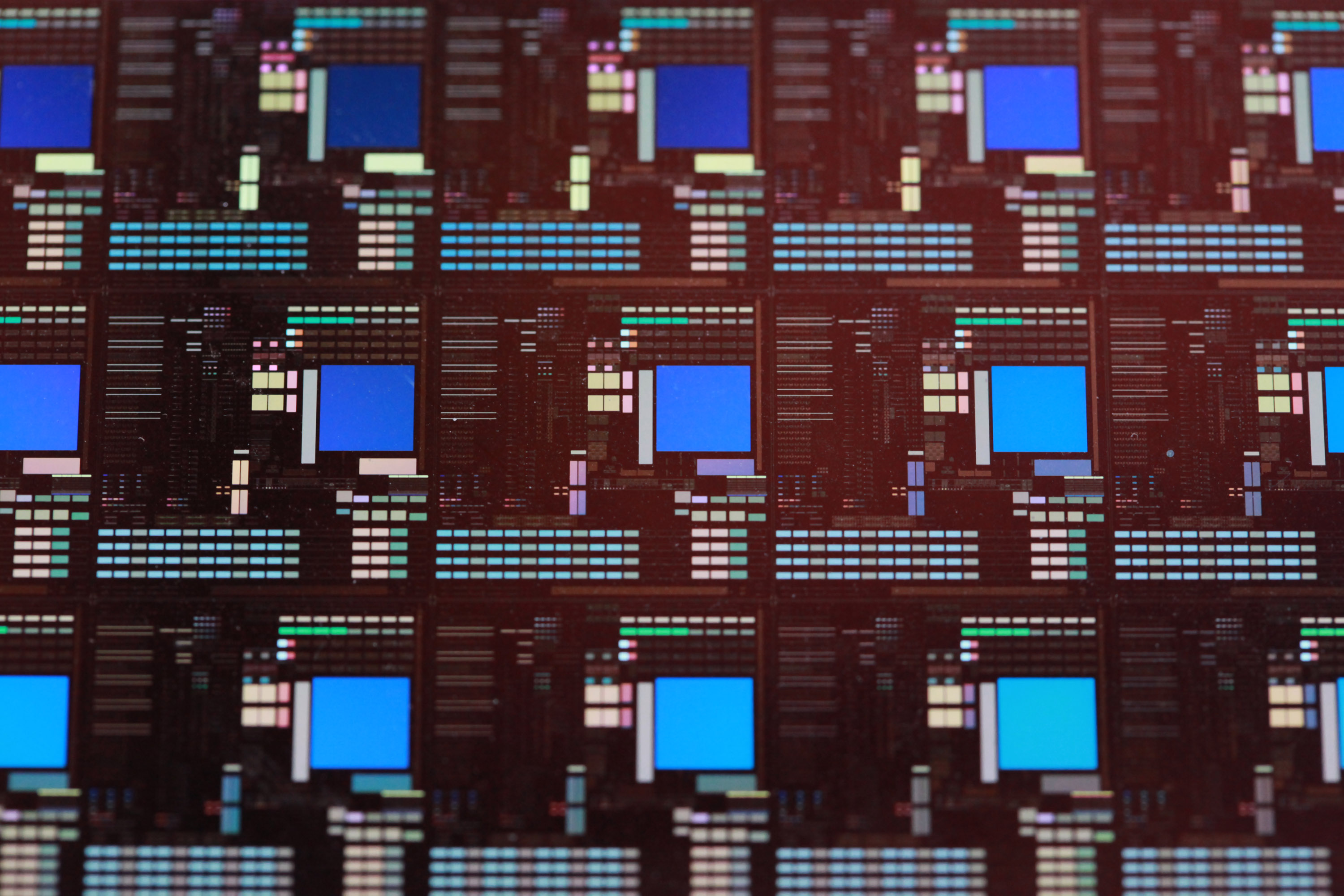 Einzelne Chips auf einem 150-mm-Wafer.